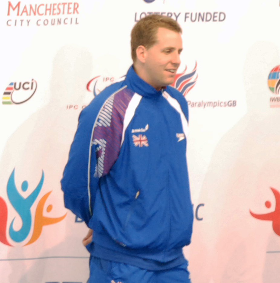 Matt Walker and Dave Roberts